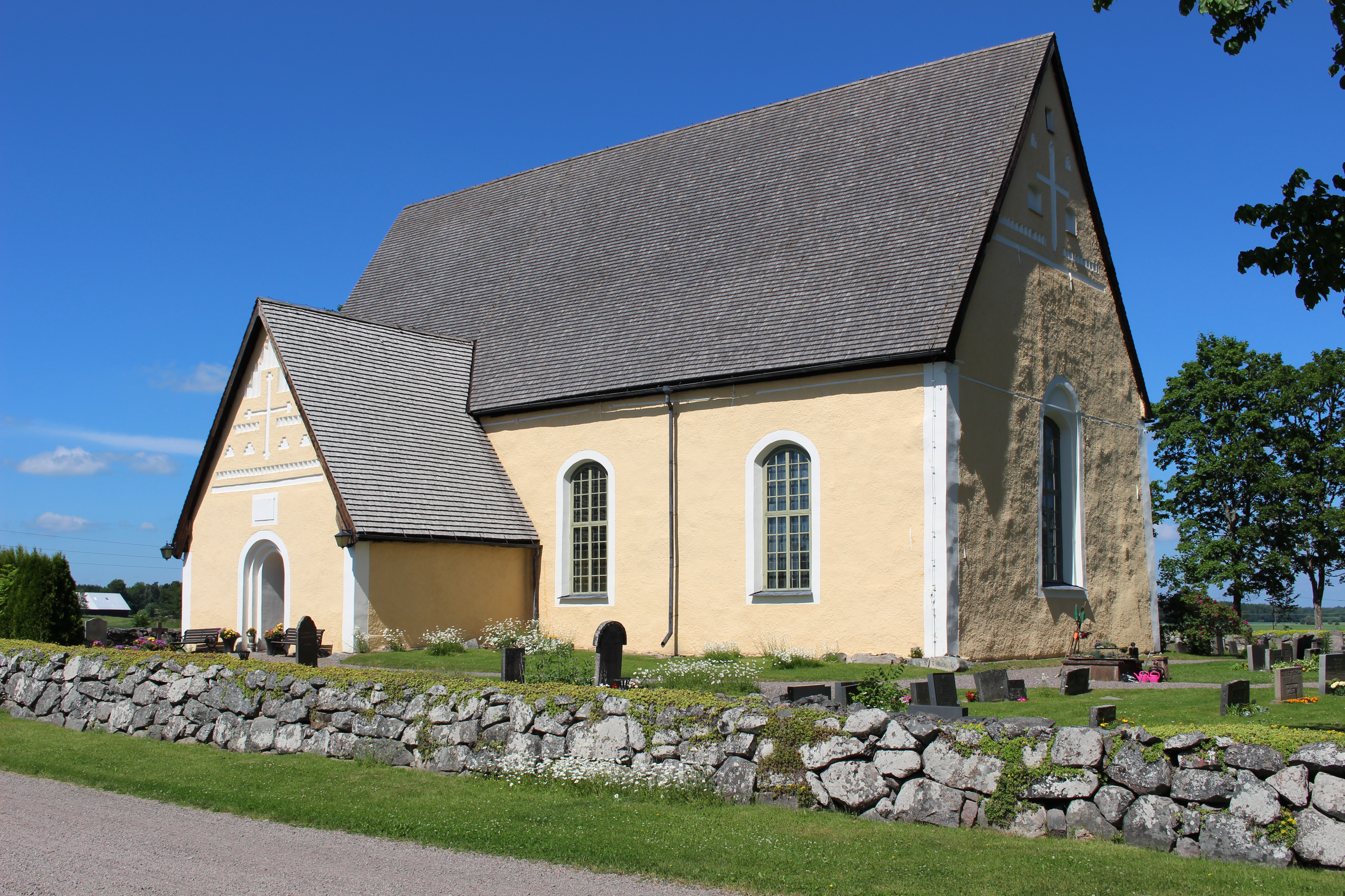 Rasbokils kyrka